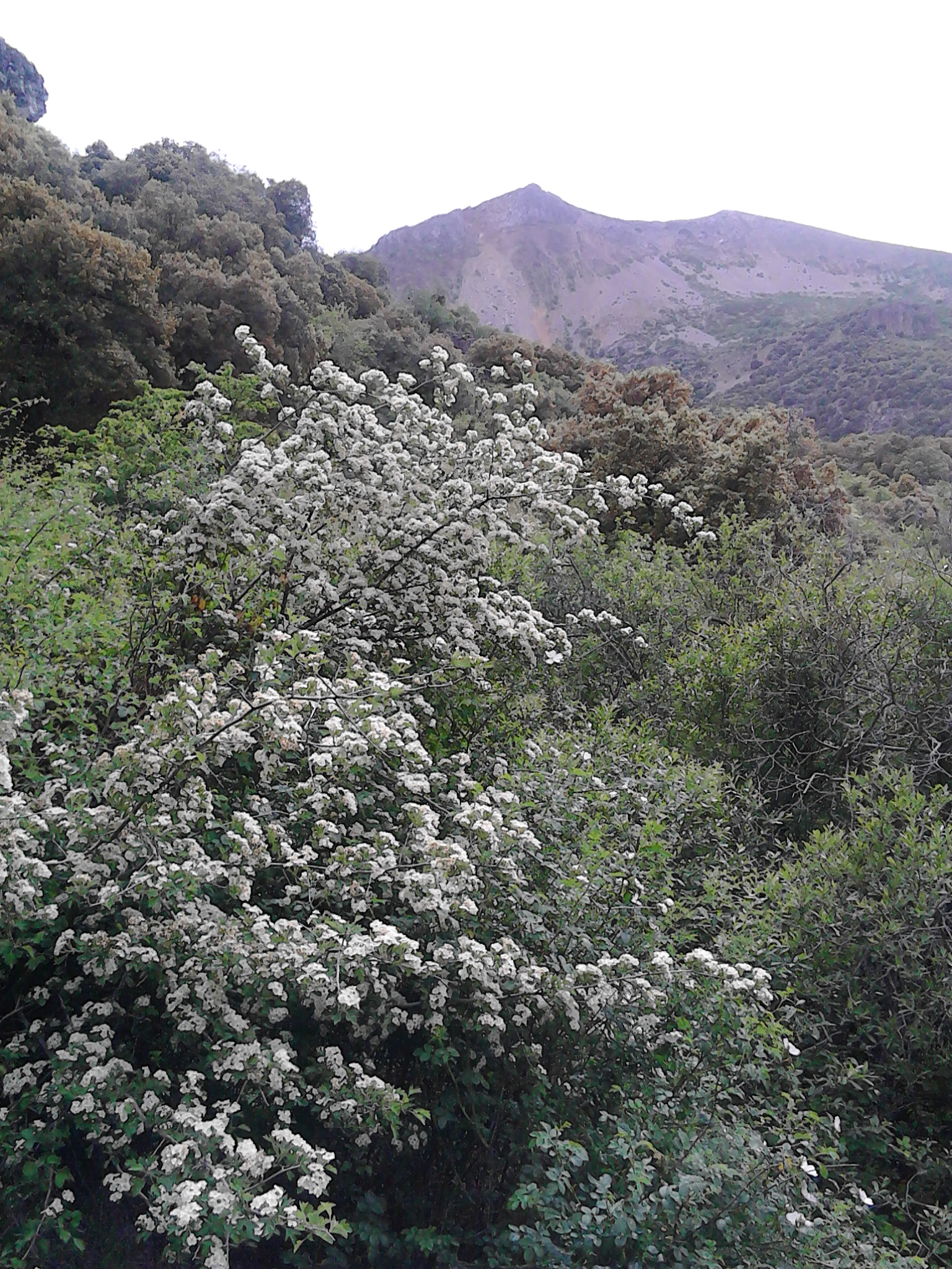 Resaltando sobre los tonos verdes oscuros de Sierra Mágina, el color blanco puro de las flores del Espino Albar o Majuelo, da un toque de colorido, al fondo más oscuro, de la vegetación del Parque Natural. This is a photography of a Special Area of Conservation in Spain with the ID: ES6160009. Natura2000 entry, EEA entry